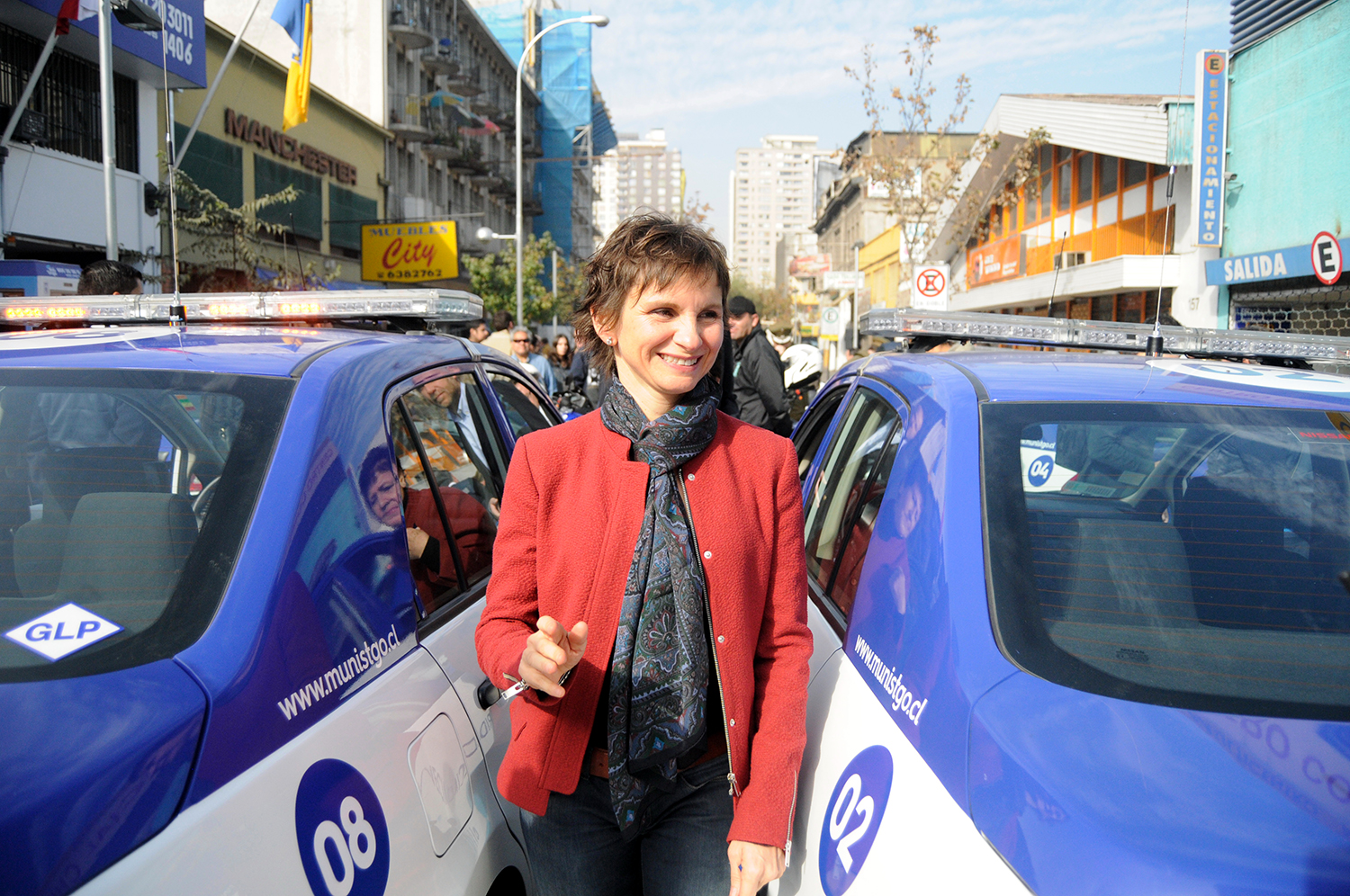 Ministro Álvaro Elizalde asiste junto a la alcaldesa de Santiago, Carolina Tohá, y al Subsecretario de Prevención del Delito, Antonio Frey, al lanzamiento del nuevo Plan de Seguridad Vecinal